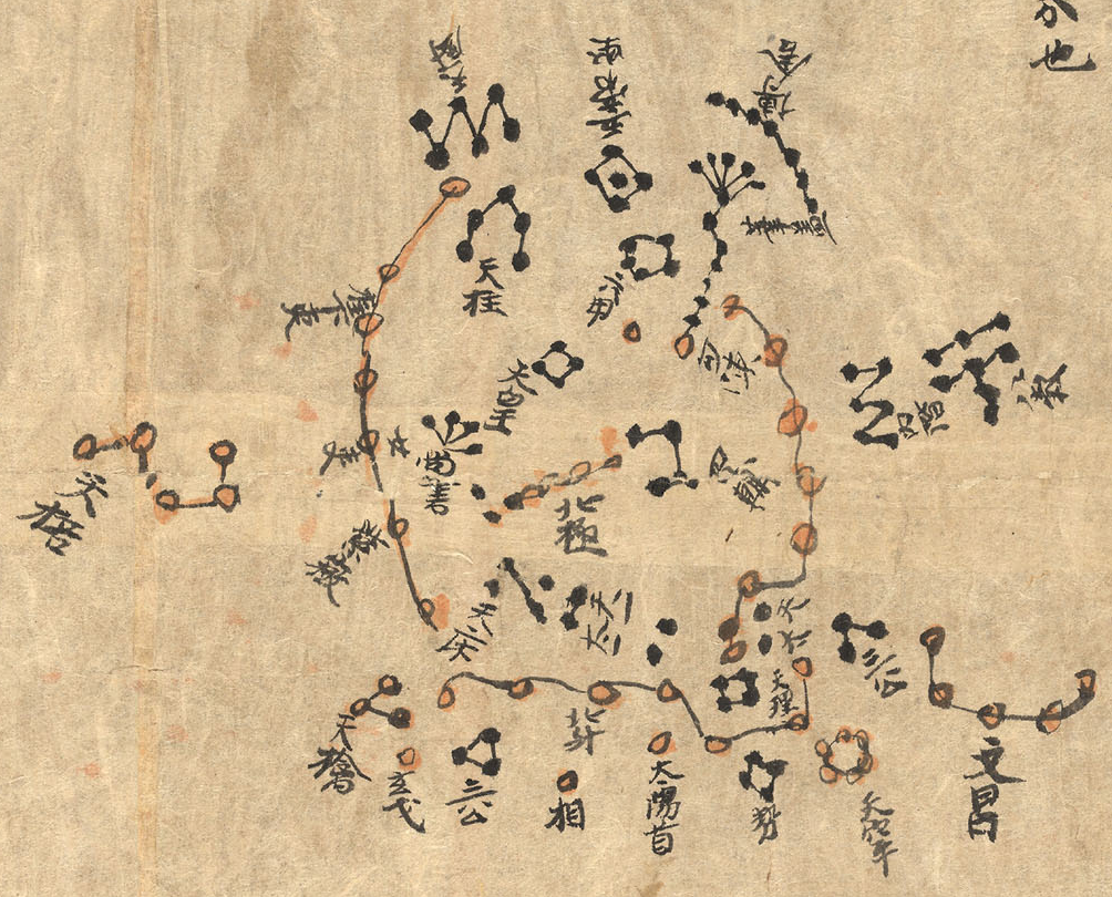 粵語: 紫微垣，出自敦煌莫高窟古卷星圖